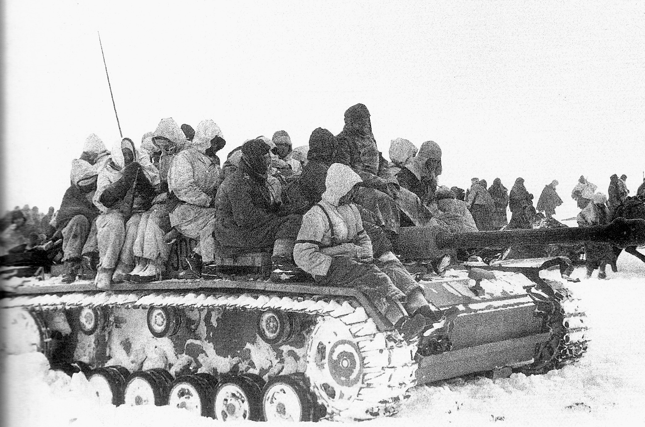 Uno cannone d'assalto tedesco STUG III e soldati durante la ritirata dell'Asse nel dicembre 1942 sul fronte del Don